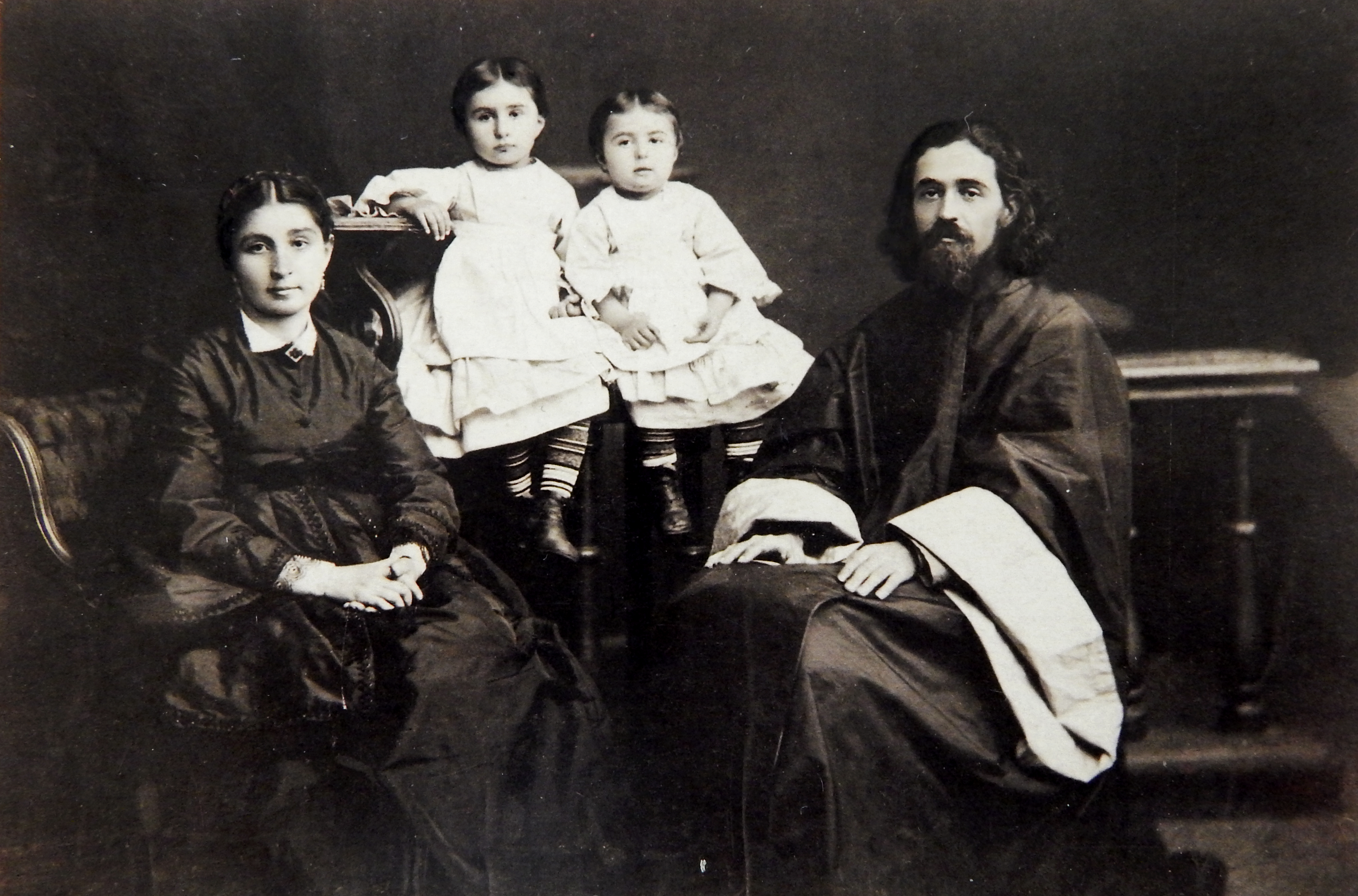 Павло Леонтійович Григорович з дружиною Олександрою Іванівною Чіжевською та дочками.